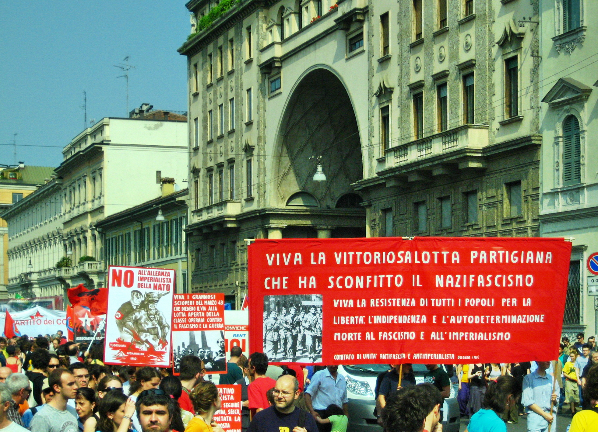 Manifestazione antifascista per il 25 aprile 2007 a Milano.